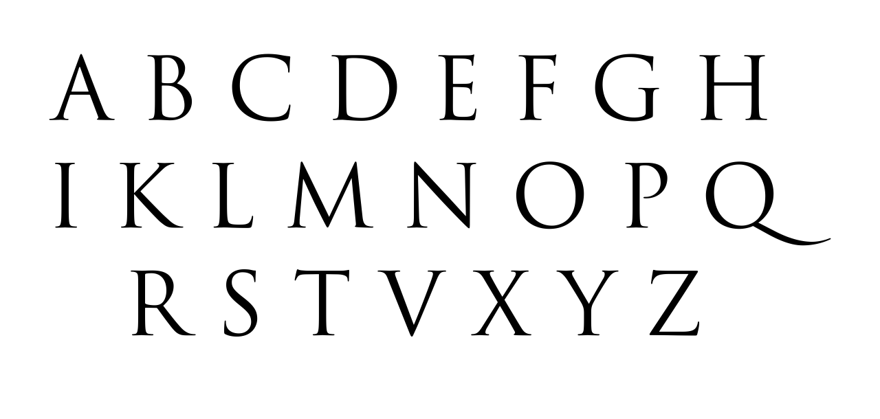 Abecedario latino clásico, que ya contaba con 23 letras.